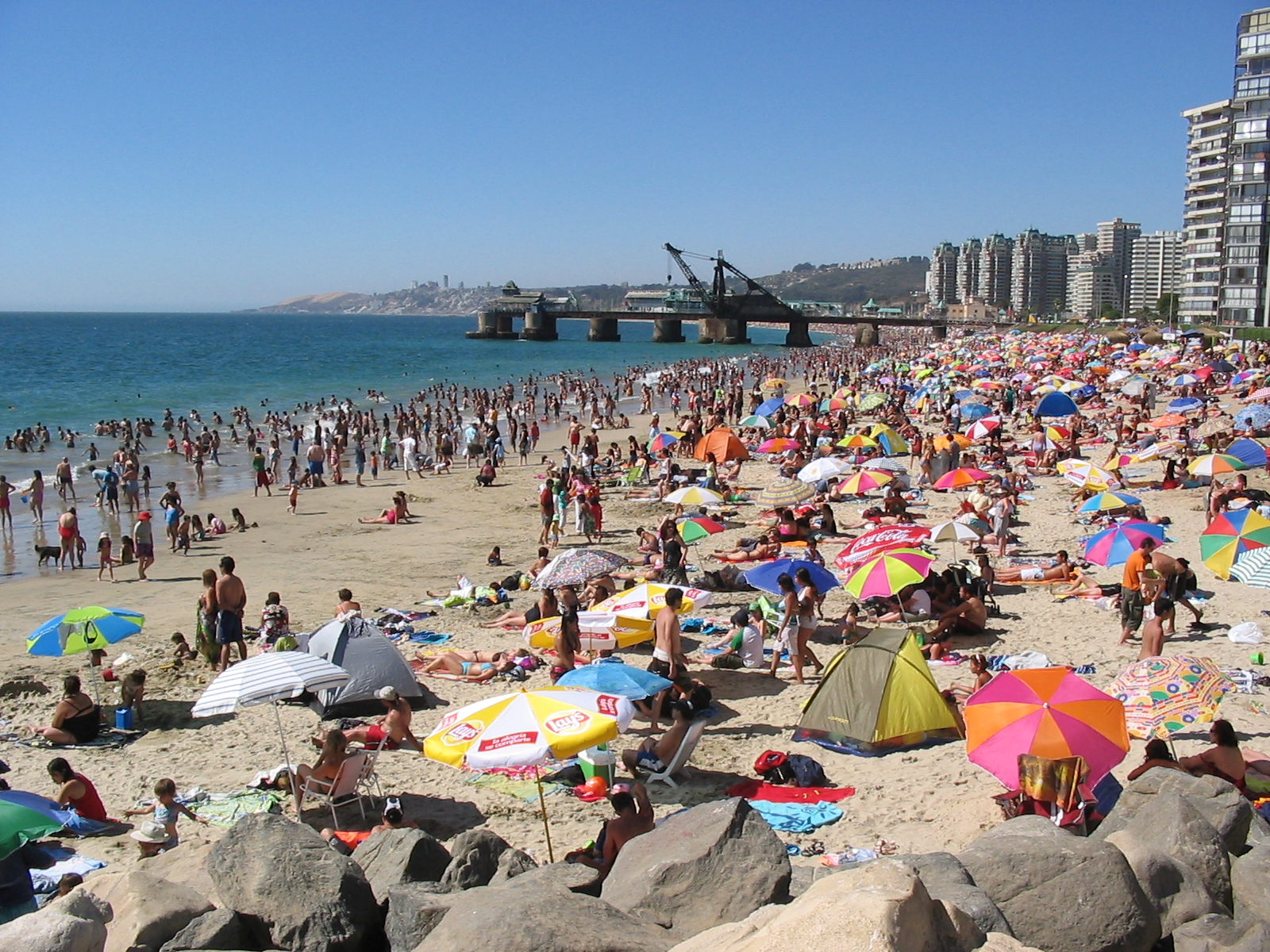 Strand von Viña del Mar (Chile)